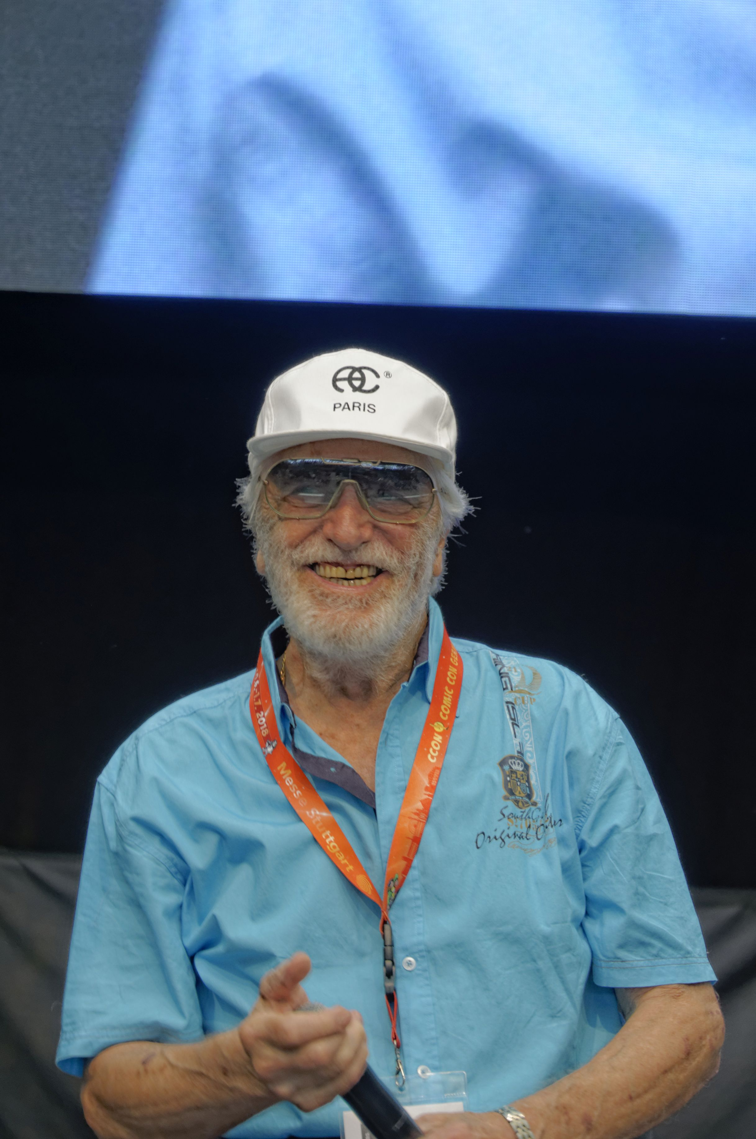 Bilder von der Comic Con Germany in Stuttgart 2018